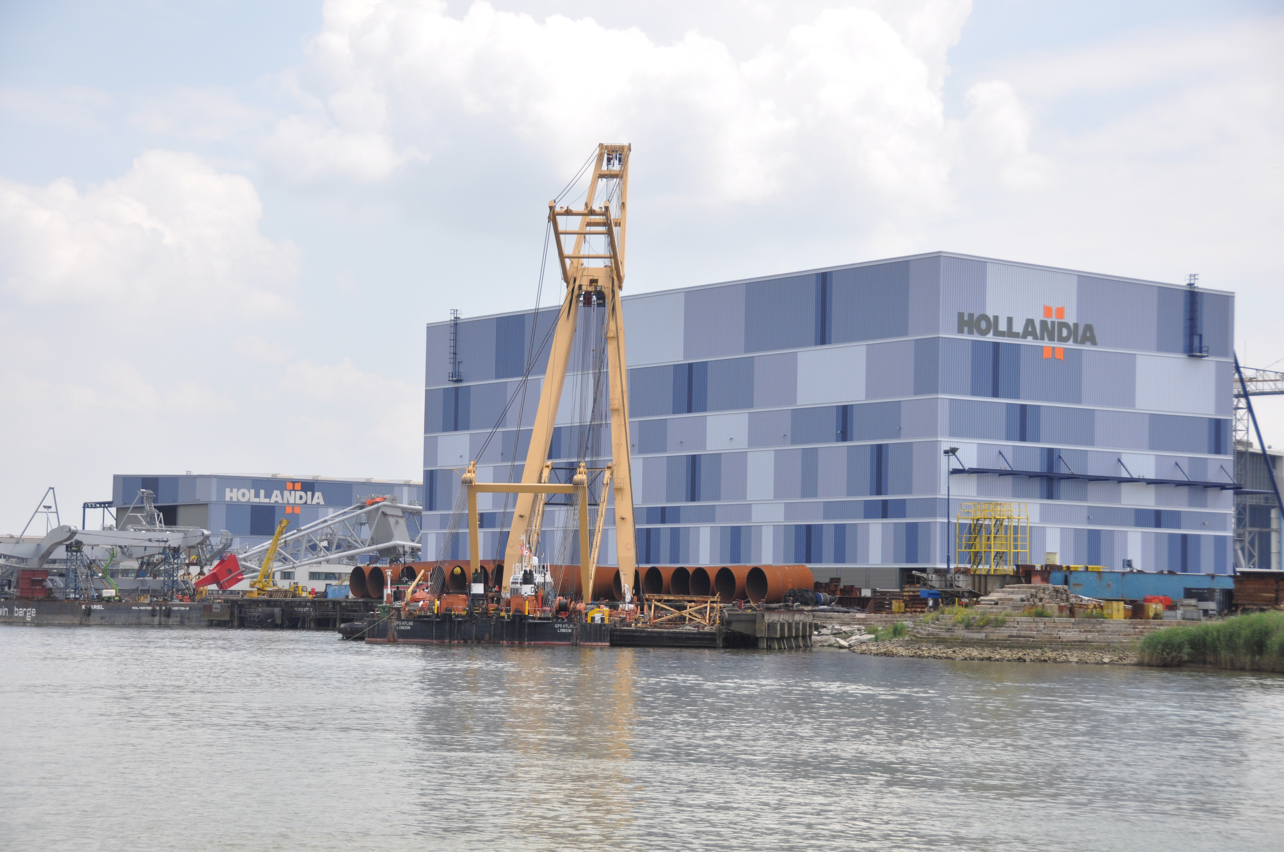 De bok GPS ATLAS met de sleper ZEEPIA aan het werk op de Hollandsche IJssel bij Krimpen.